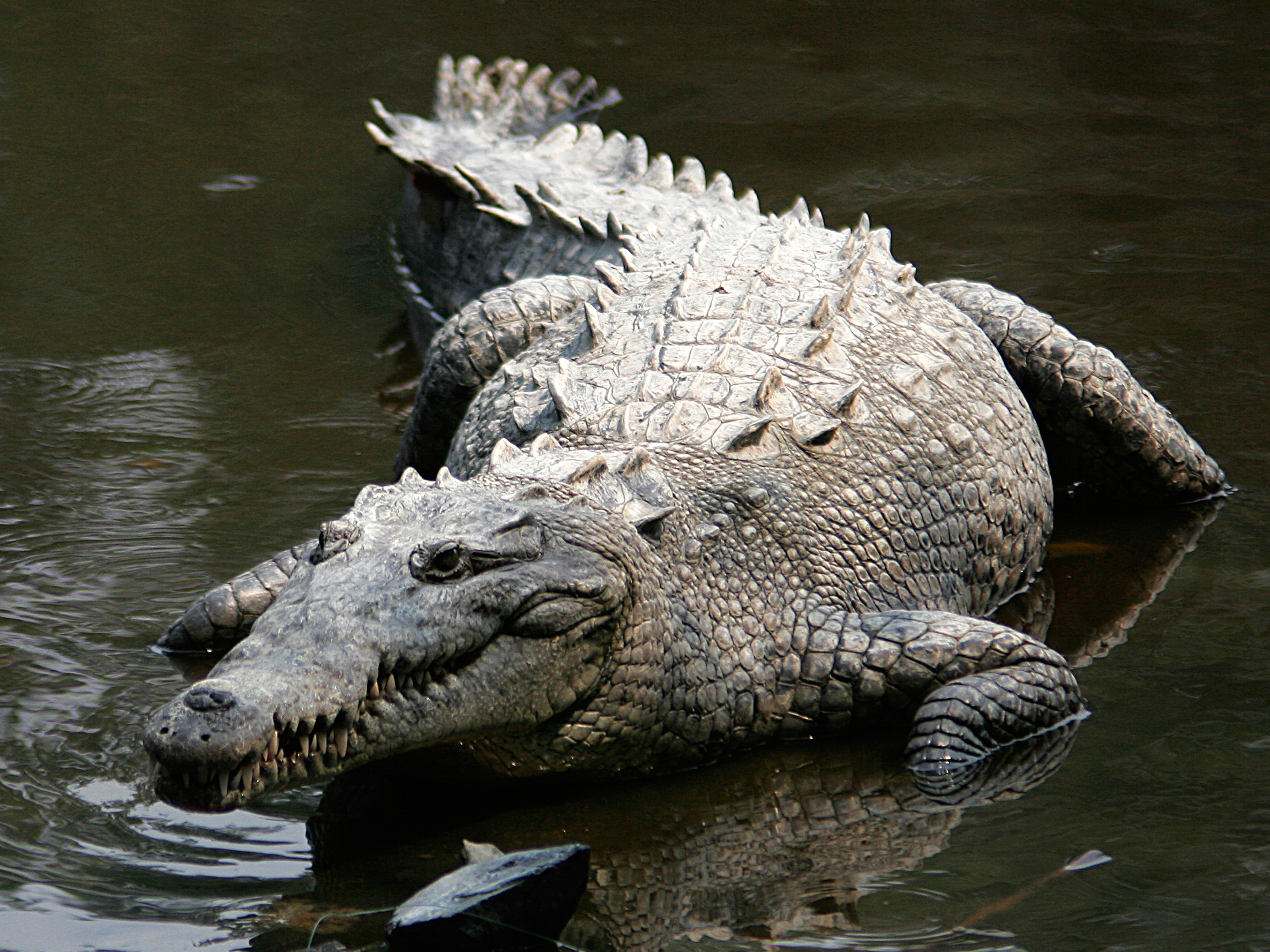 Crocodylus acutus, American Crocodile, Cocodrilo Americano. Photo taken at La Manzanilla, Jalisco, Mexico